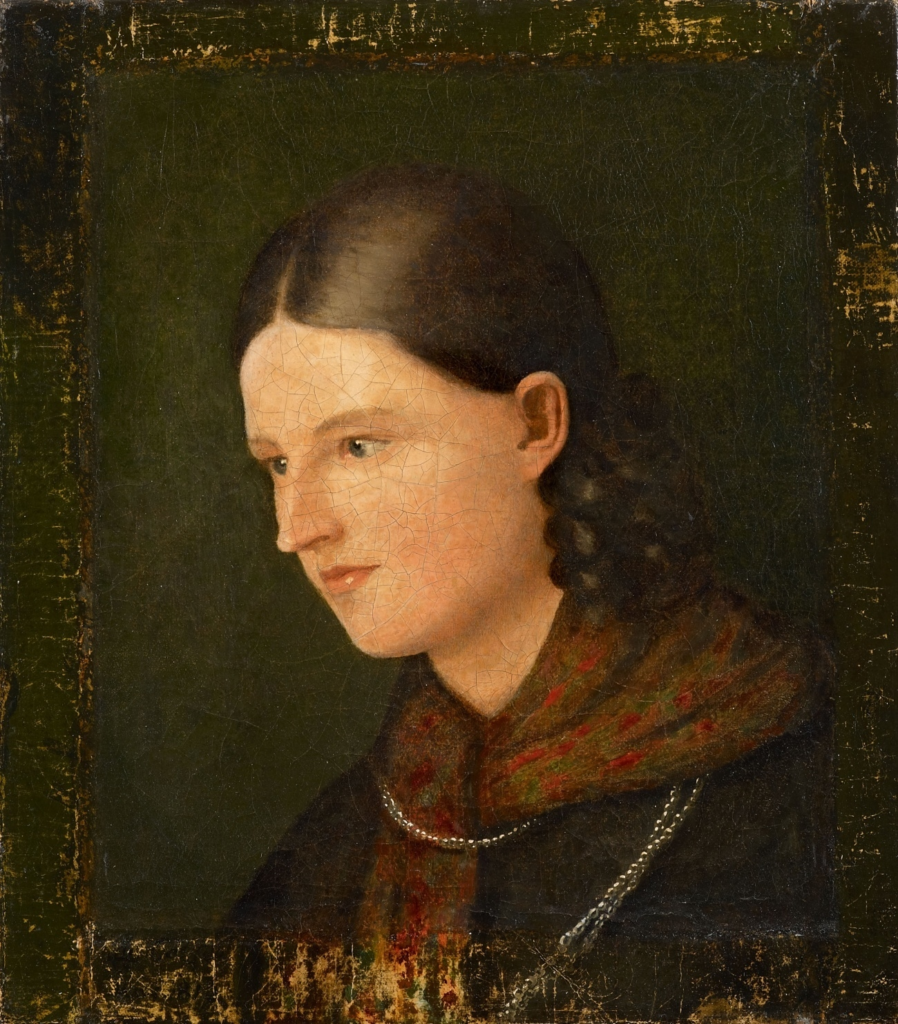 Portrait der Amalie Hassenpflug. Monogrammiert und datiert unten links: LEG (ligiert) Cassel May 181(8) Öl auf Leinwand. 42 x 37 cm.